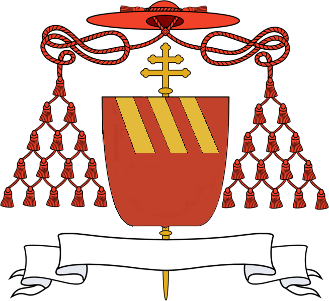 modifica del file di P. Jaworski ( PioM ),POLAND/Poznań; 14V2005